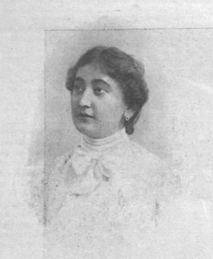 Wilhelmine Adamovic (Adamovitch) Adamovics Vilma